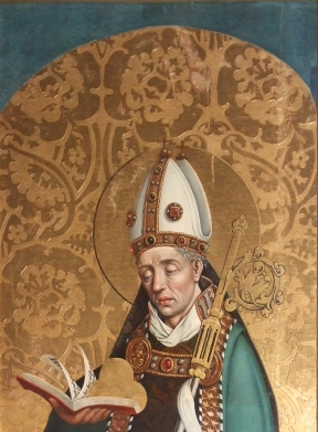 Pfarrkirche St. Dionysius, Munderkingen, Alb-Donau-Kreis Ein Heiliger